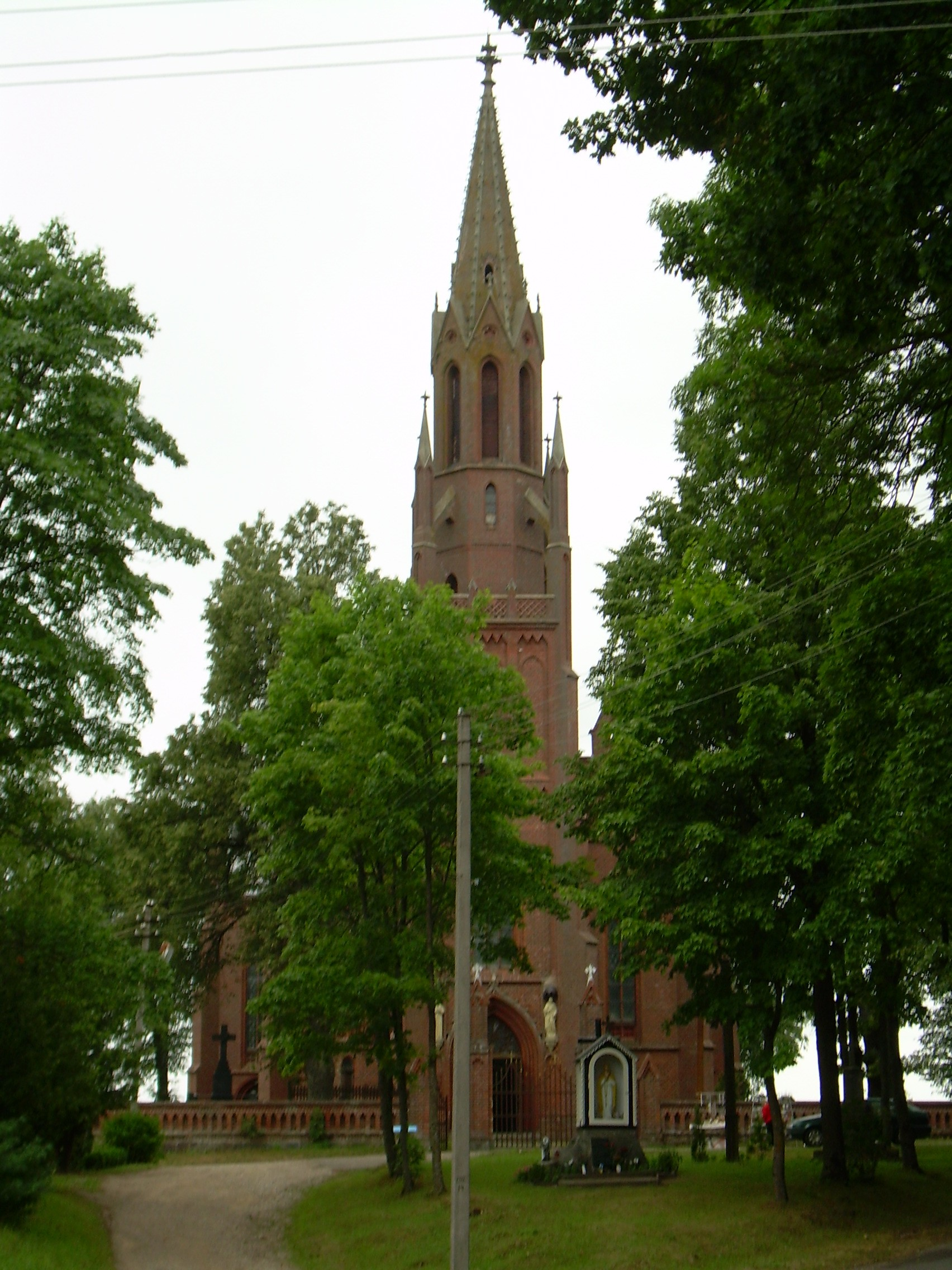 Šateikių Šv. evangelisto Morkaus bažnyčia